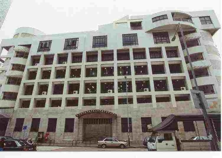 中文（香港）: 聖中五校A座